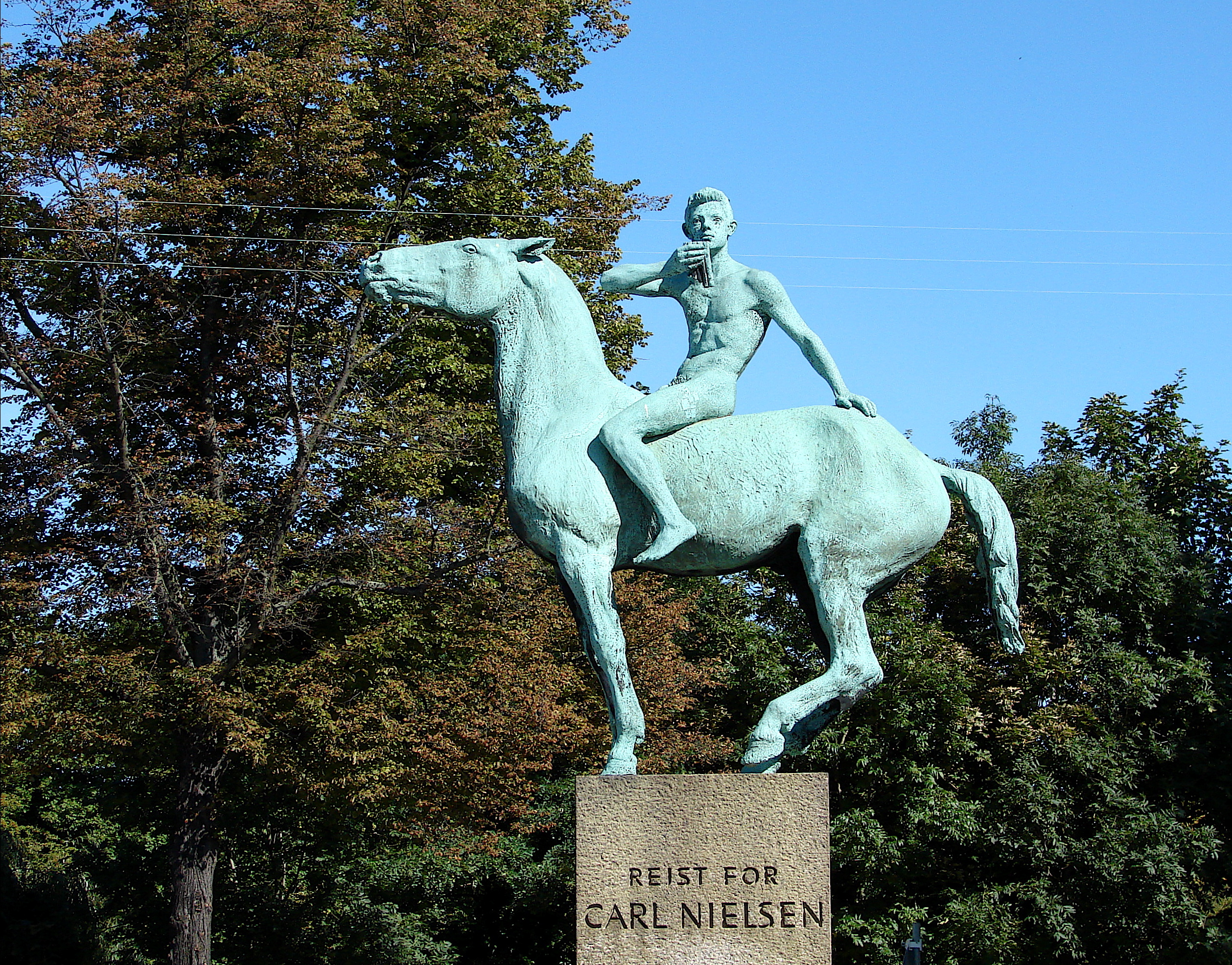 Carl Nielsen mindet, København, Anne Marie Carl Nielsen